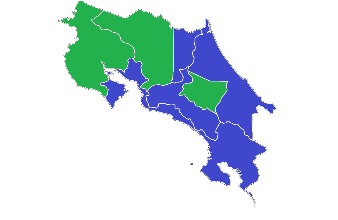 Resultados electorales provinciales 1958 fuente